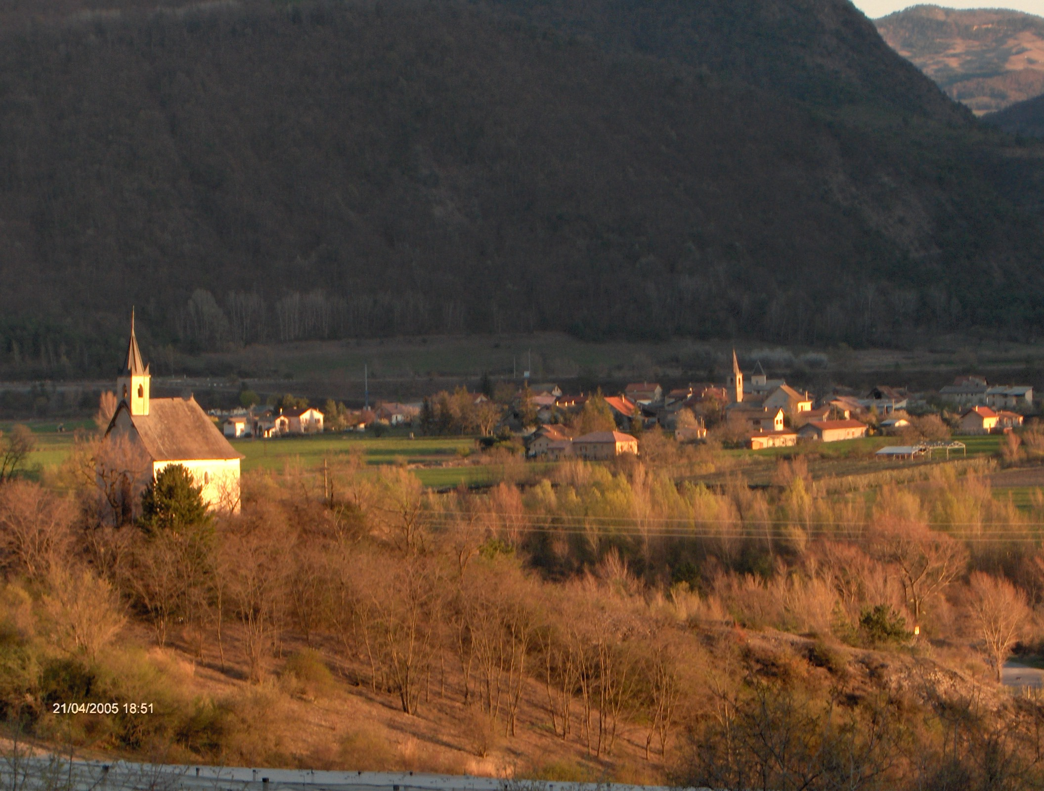 Commune de Rochebrune dans le département des Hautes Alpes.